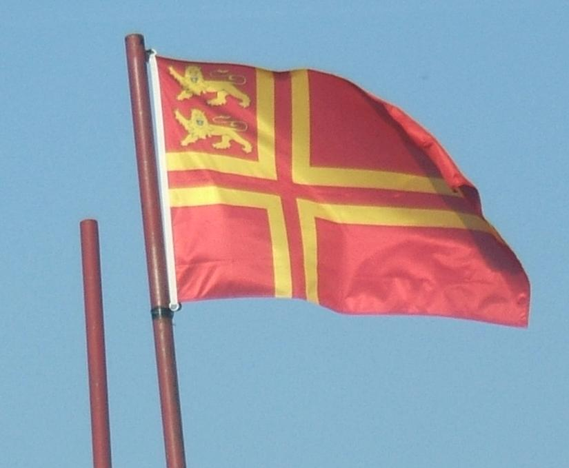 Drapeau Falaisien